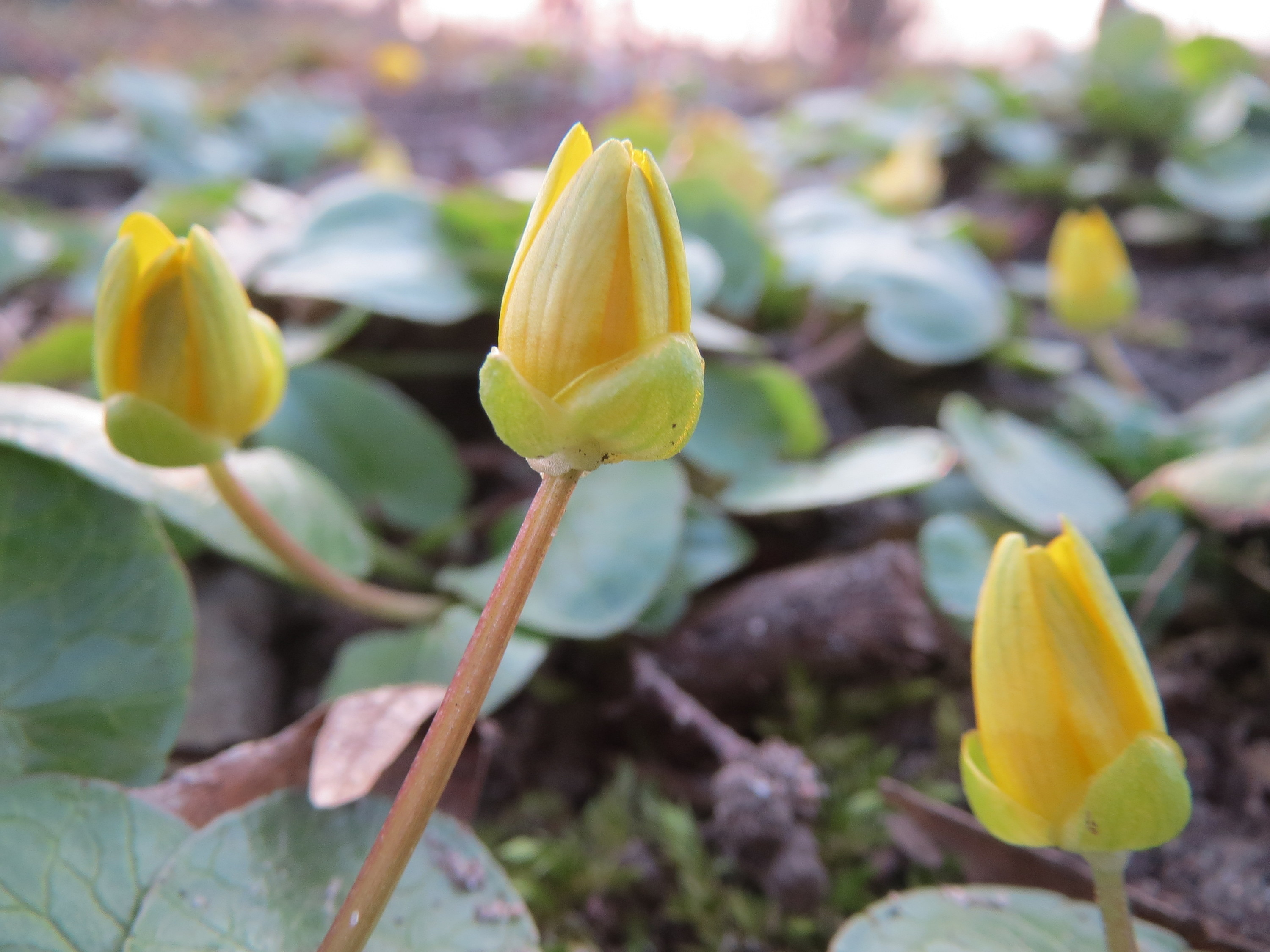 Scharbockskraut (Ficaria verna) im Landesgartenschaupark in Hockenheim